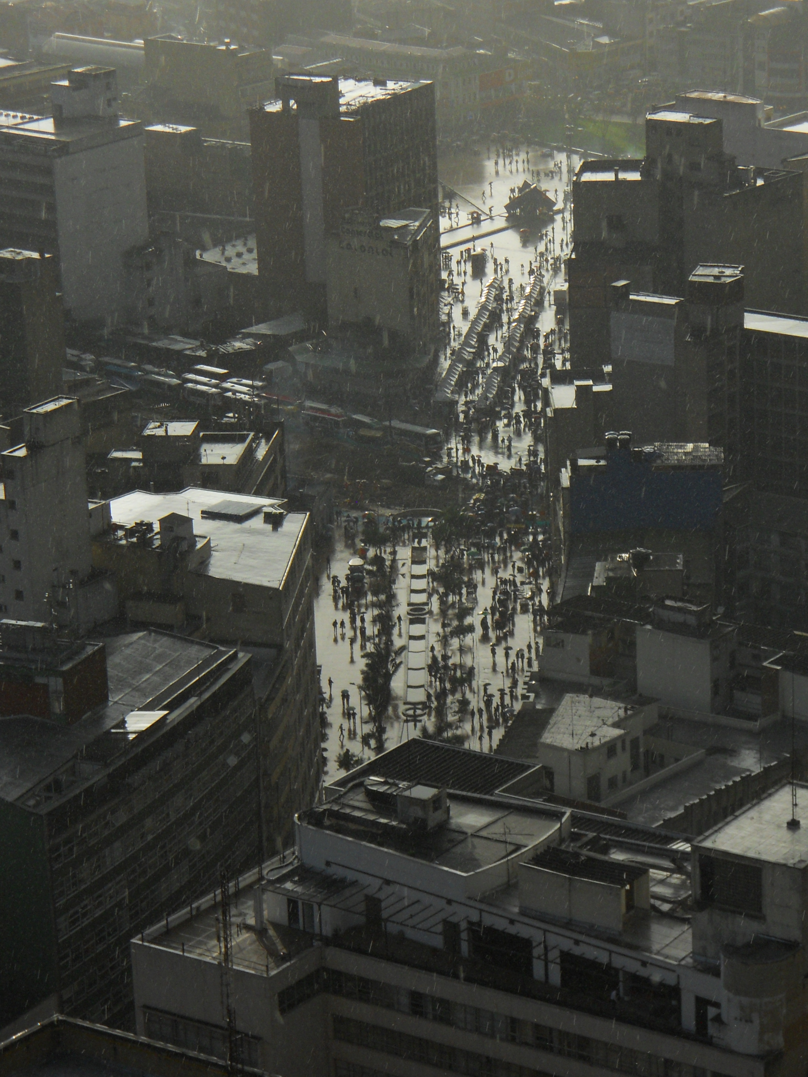 Lluvia sobre el Eje Ambiental de Bogotá.